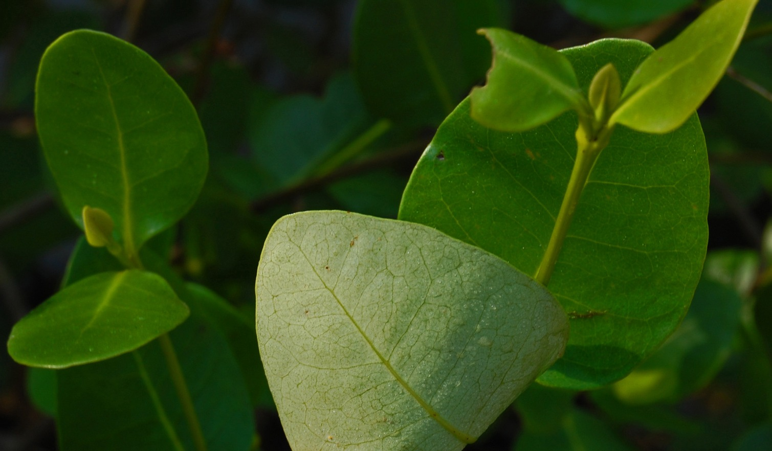 Avicennia marina leaves, Muara Angke, Jakarta, Indonesia